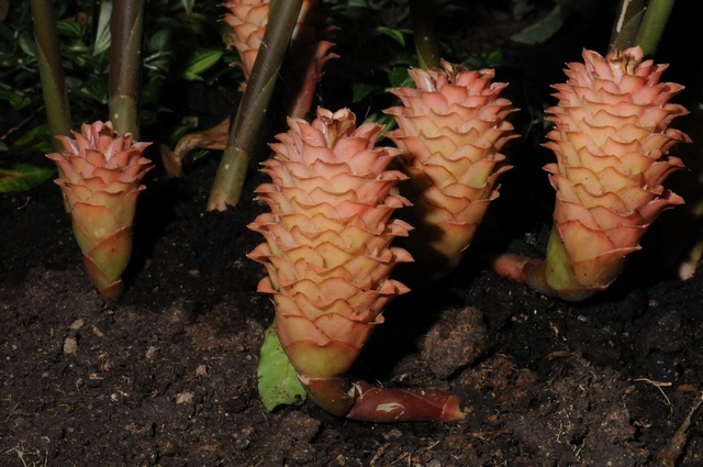 Zingiber wrayii Groupe d'inflorescences (Væksthuset, Botanisk Have, Århus)